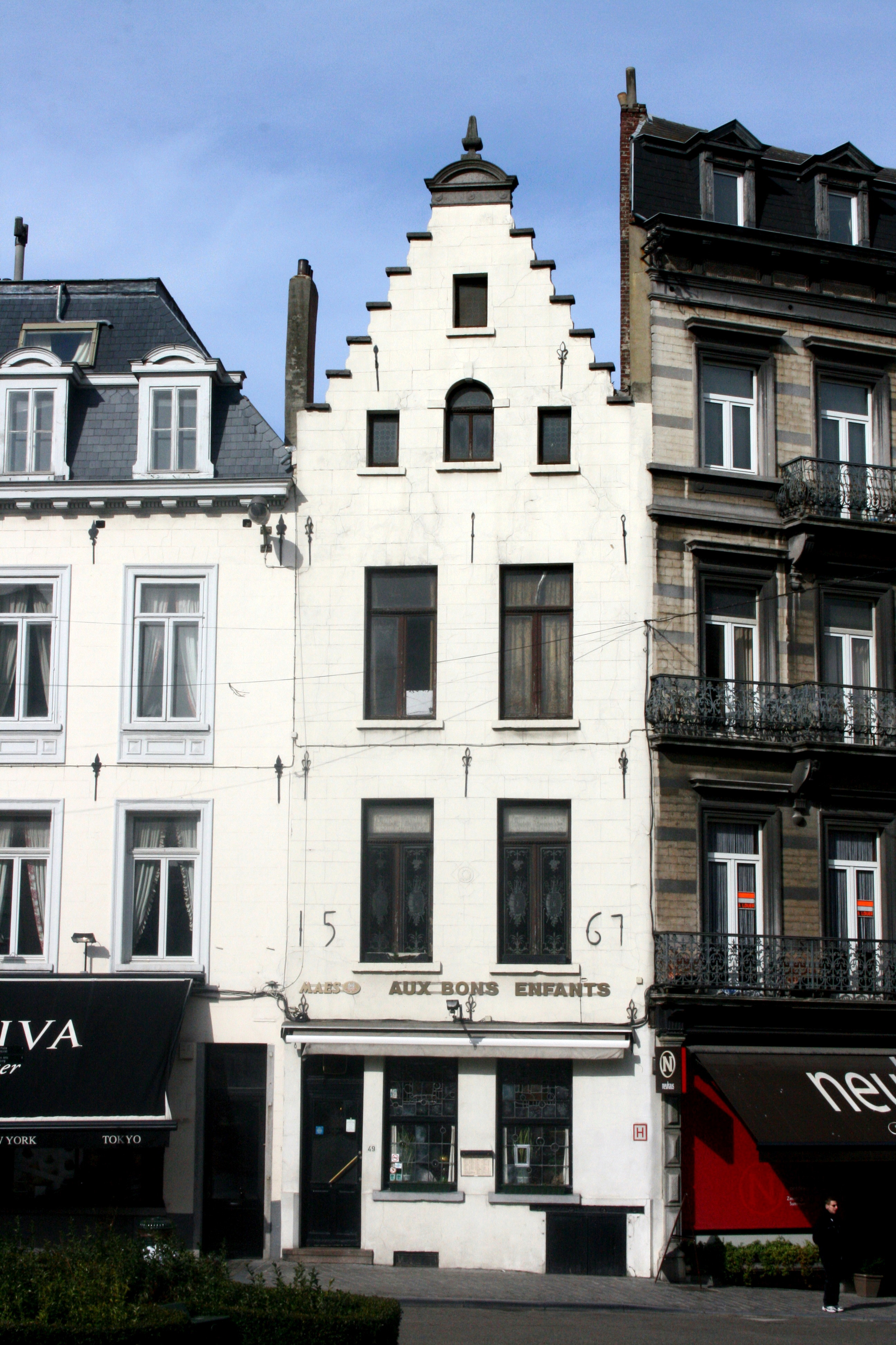 Place du Grand Sablon 49, Bruxelles (Belgique). Maison à pignon à gradins millésimée "1567" ; Aux Bons Enfants